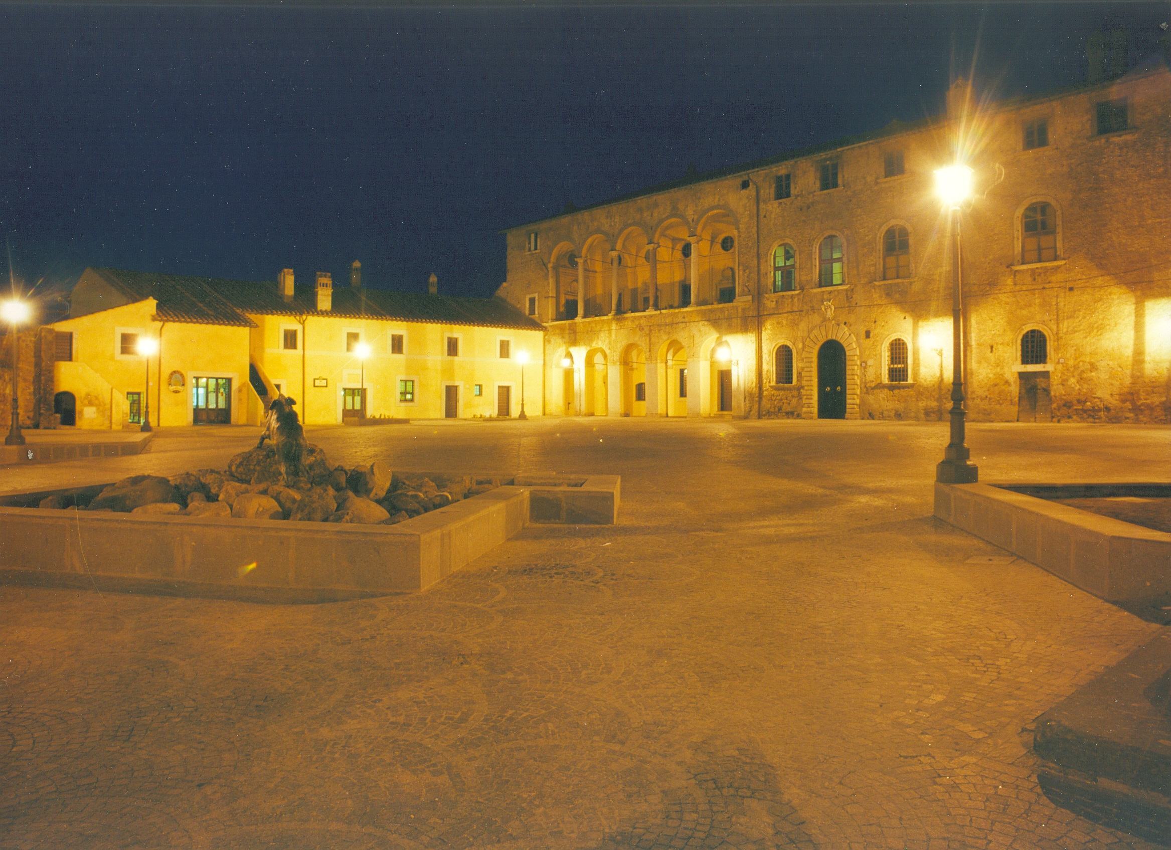 Piazza Santa Maria